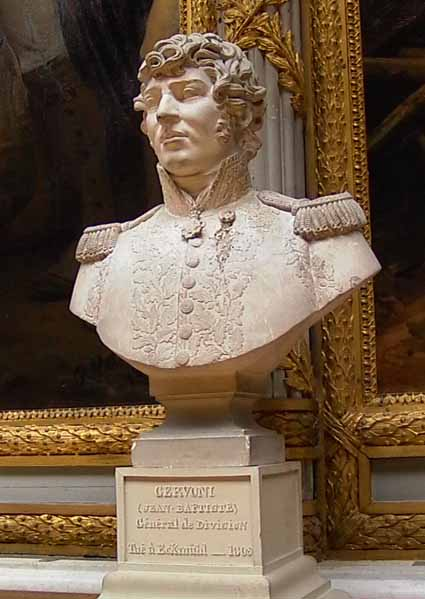 Generale Cervoni